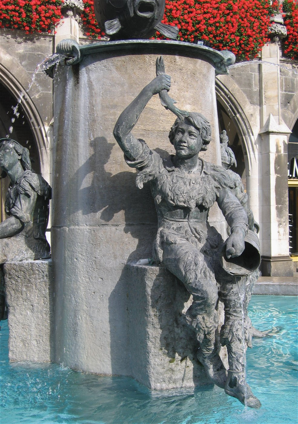 Fischbrunnen in München (Detail: Ein Metzegergeselle entleert seinen Wassereimer in den Brunnen.)